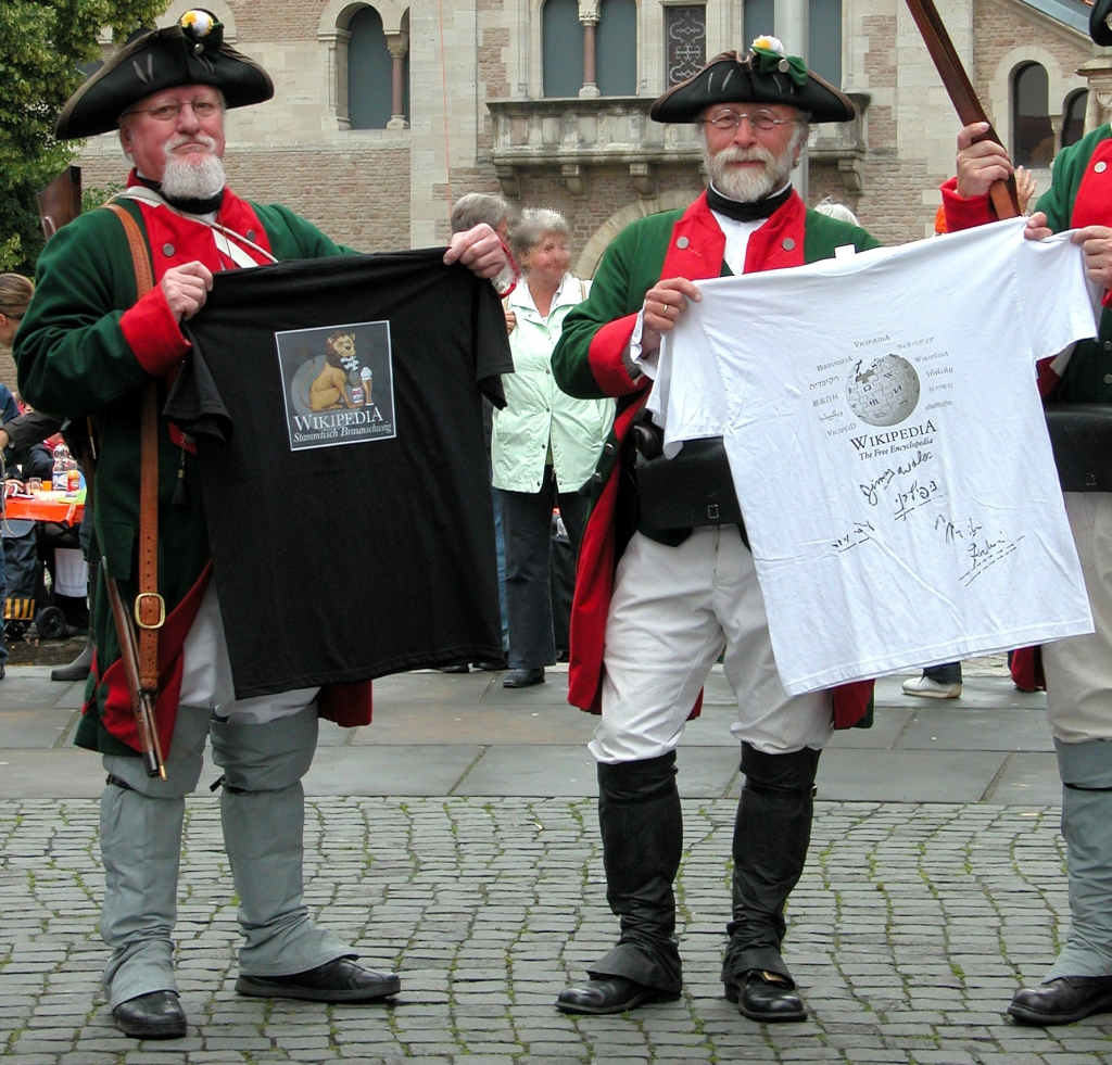 Zwei Braunschweiger Jäger, darunter Thomas Ostwald (rechts) mit einem T-Shirt des Braunschweiger Wikipedia-Stammtisches mit dessen Logo und dem Weißen Free Travel-Shirt anlässlich des 3. Braunschweiger Bürger-Brunches.